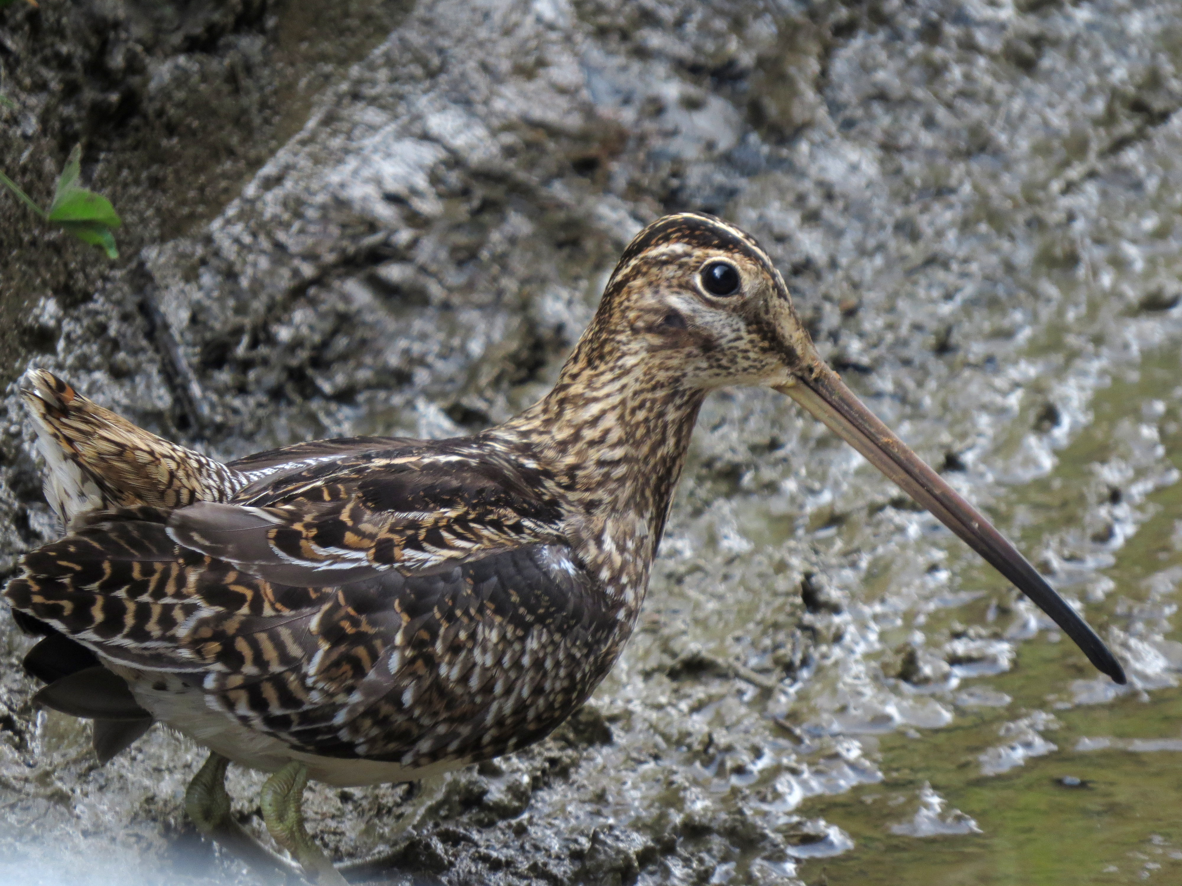 Gallinago nobilis (Caica paramuna)